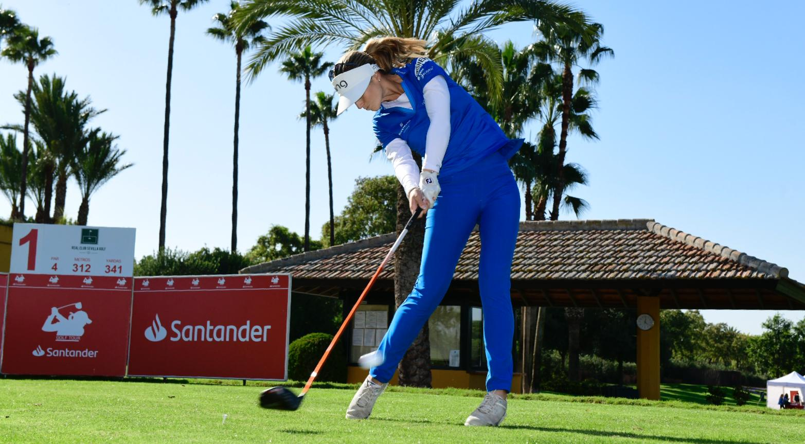 Noemí Jiménez haciendo swing de salida en el torneo del Santander Golf Tour celebrado en Sevilla